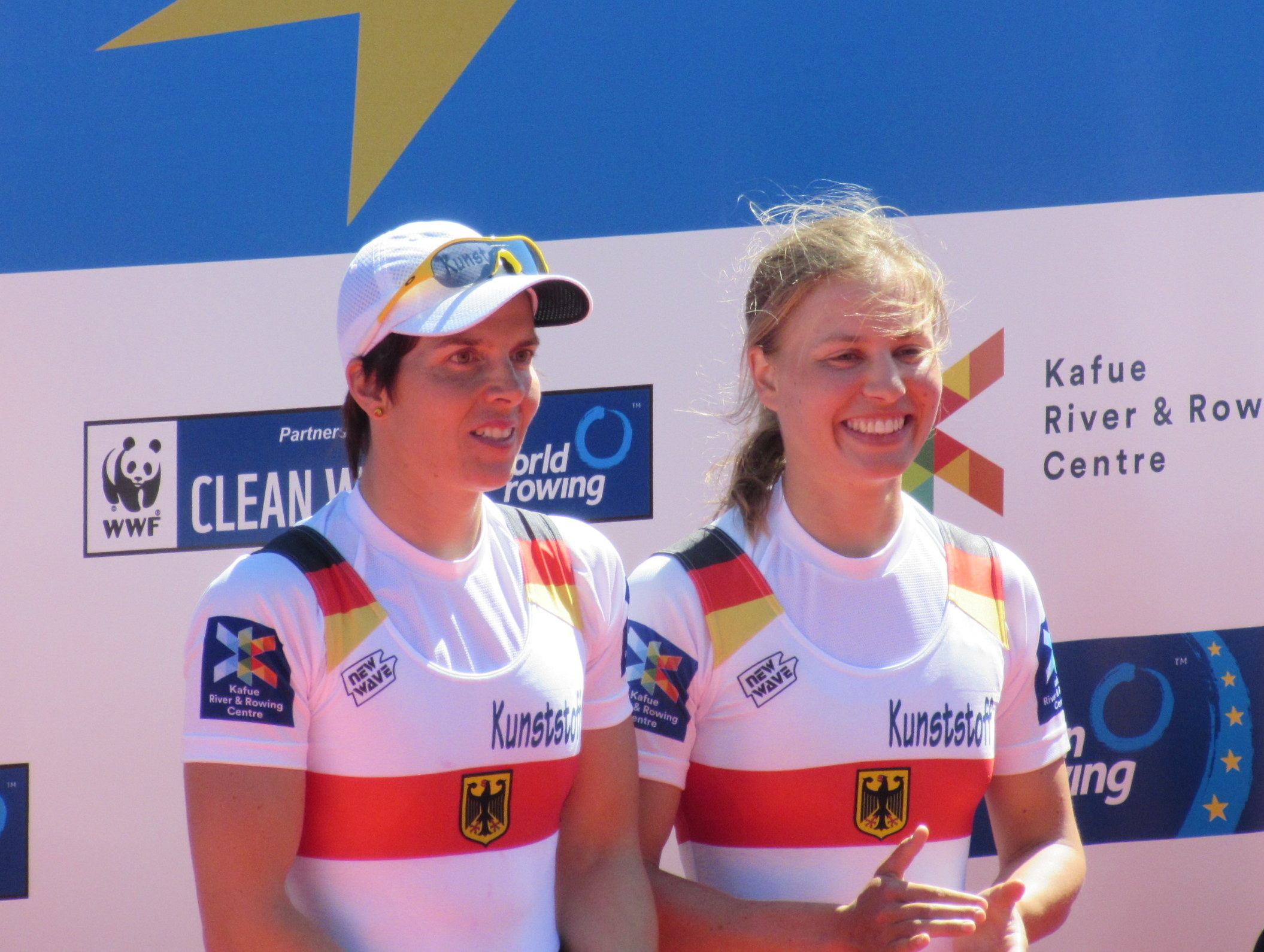 Marie-Louise Dräger und Ronja Fini bei der Siegerehrung; Ruder-EM 2016; 8. Mai 2016